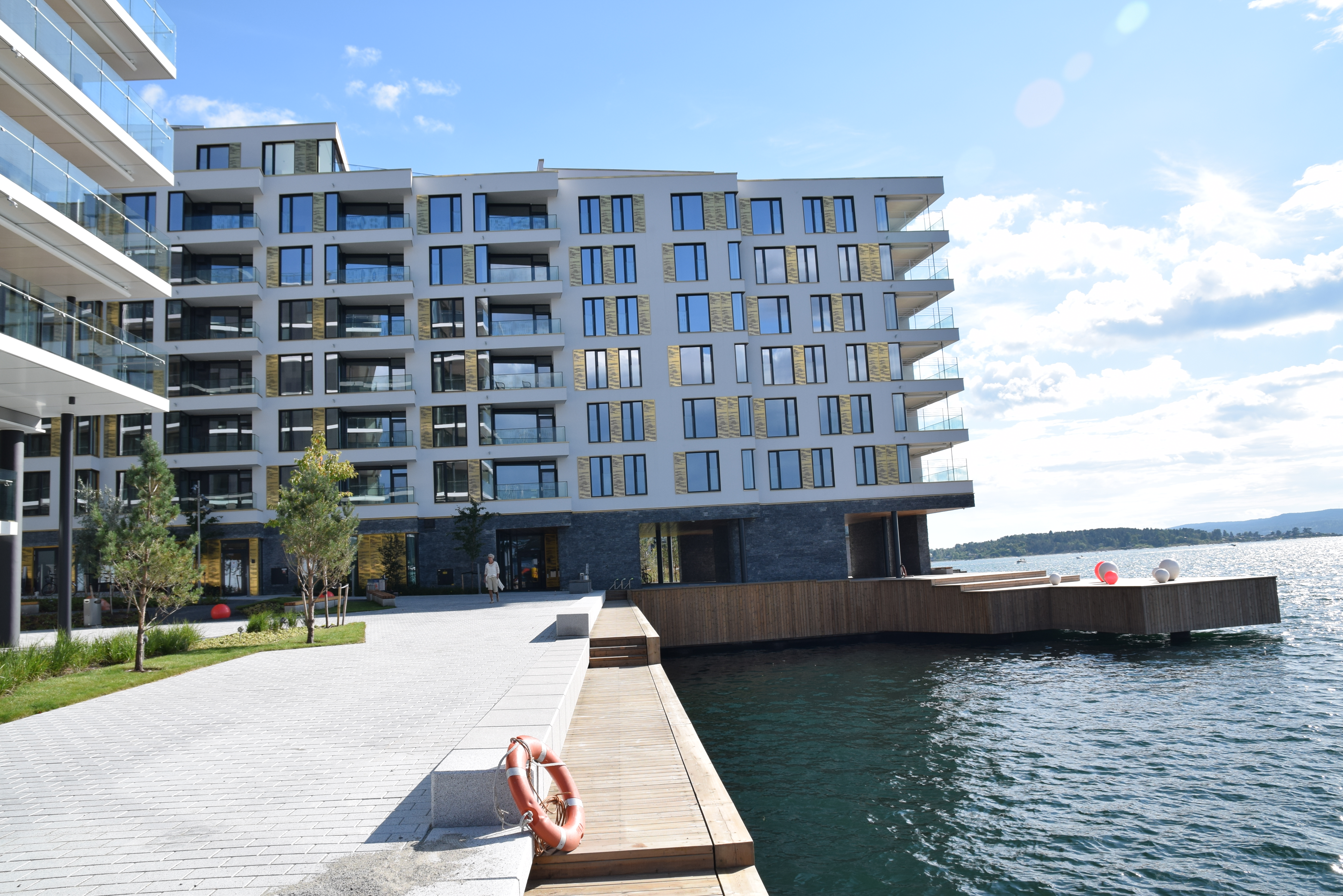 Dyna brygge, Tjuvholmen, Oslo med boliger som ligger mellom Dyna brygge og Fru Kroghs brygge